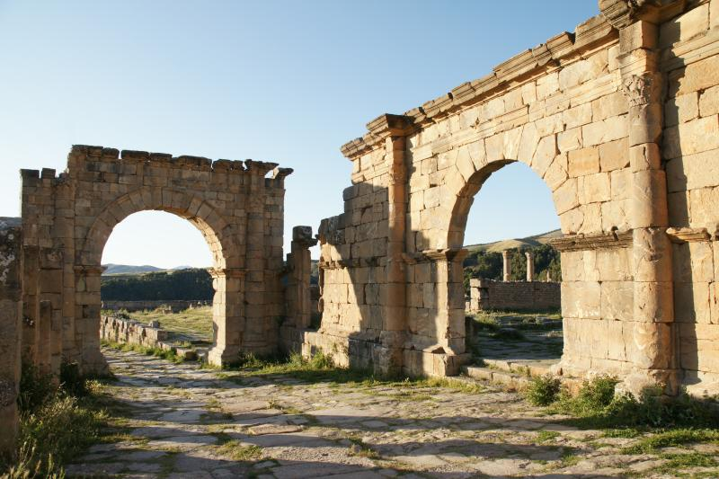 Djémila